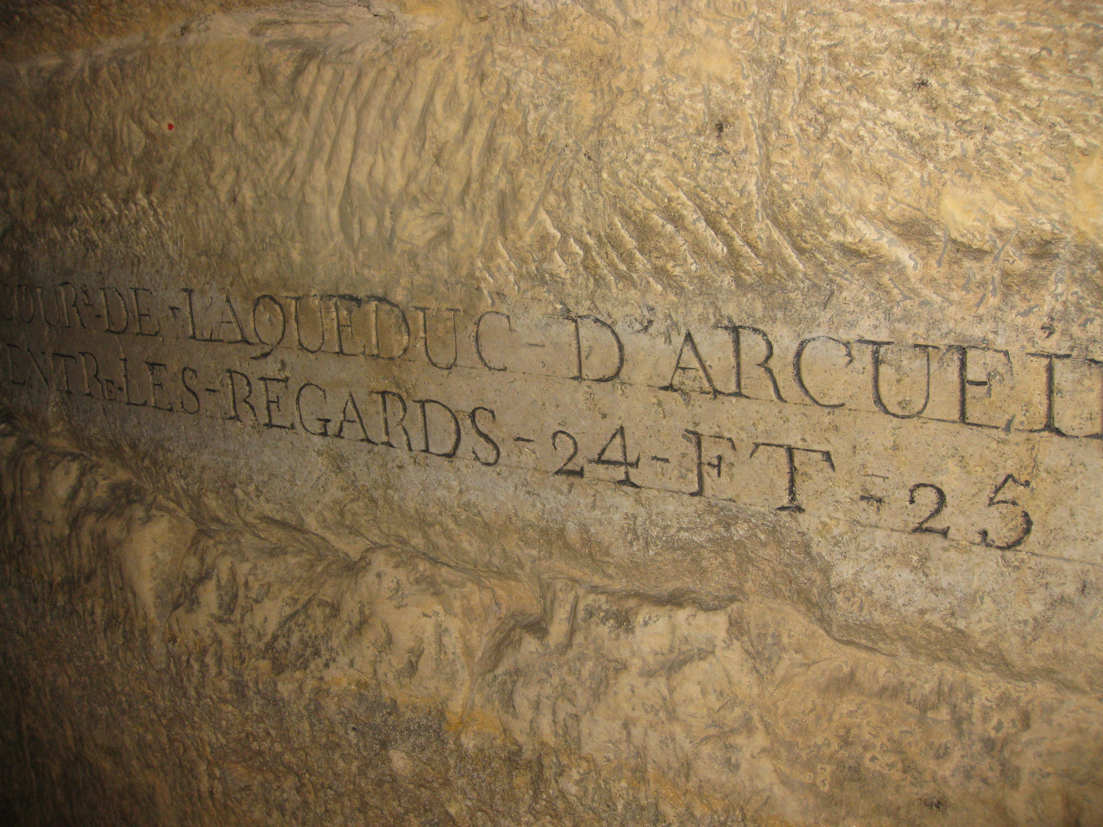 Catecombes de Paris הקטקומבות של פריז